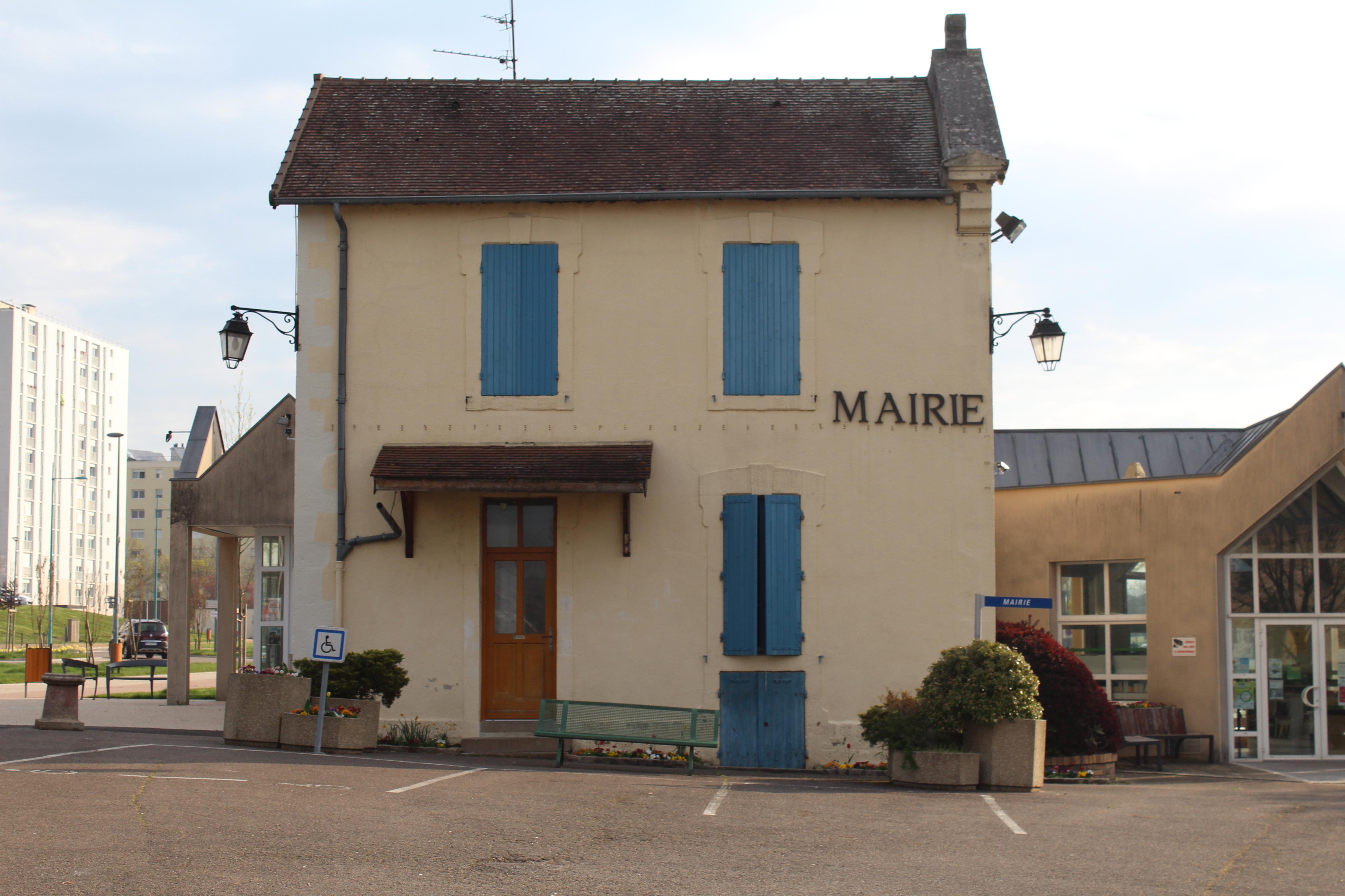 Ancienne mairie de Saint-Pantaléon qui a été absorbée par Autun, aujourd'hui mairie de proximité.